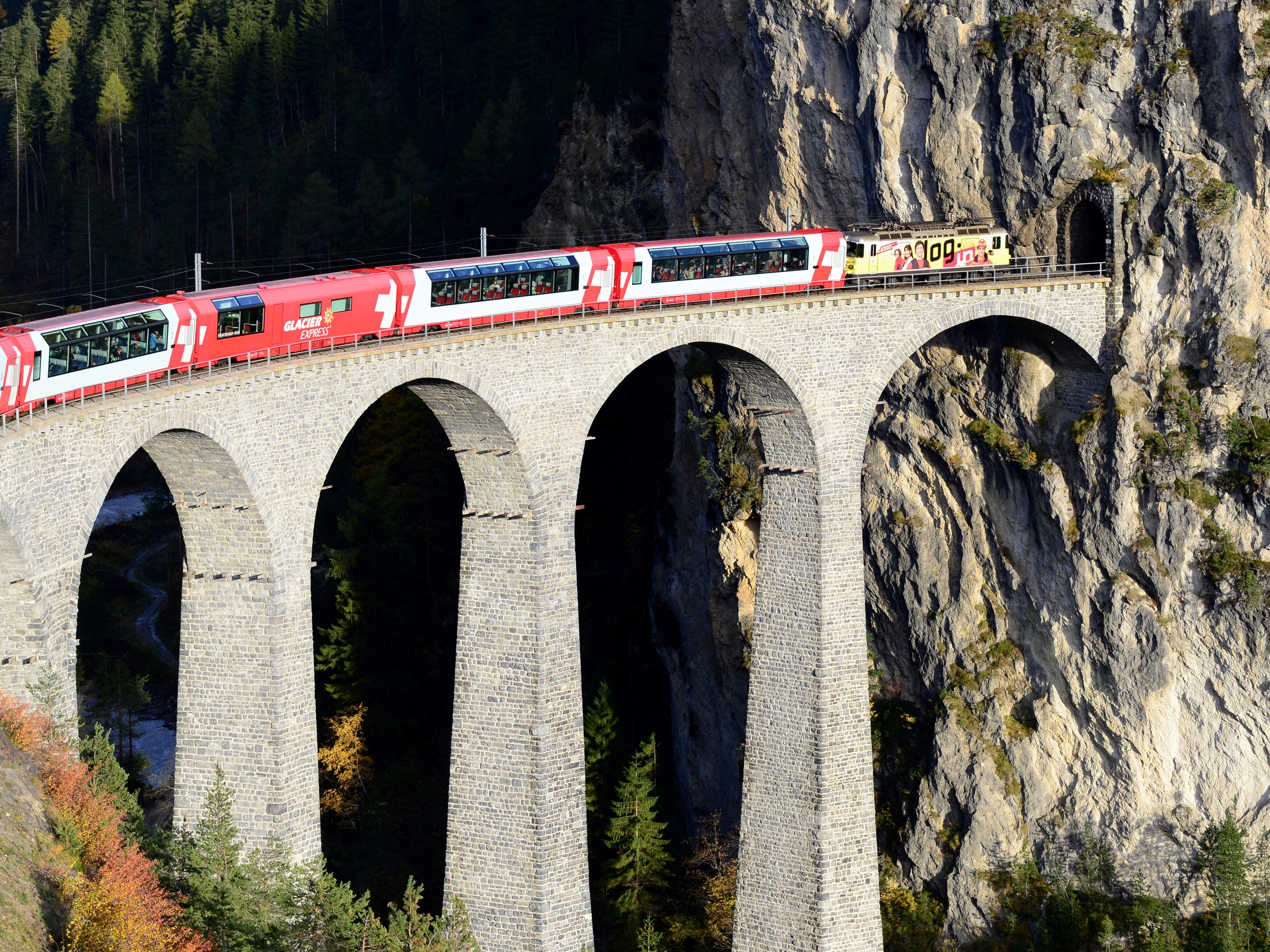 Ein Glacier-Express mit einer RhB Ge 4/4 II fährt bergwärts über den nachstehend beschriebenen Viadukt: Das Landwasserviadukt ist eine 65 m hohe und 136 m lange Eisenbahnbrücke im Netz der Rhätischen Bahn in der Nähe des Bahnhofs Filisur und gilt als ein Wahrzeichen der Bahngesellschaft. Der Viadukt gehört seit dem 7. Juli 2008 zum UNESCO-Weltkulturerbe.